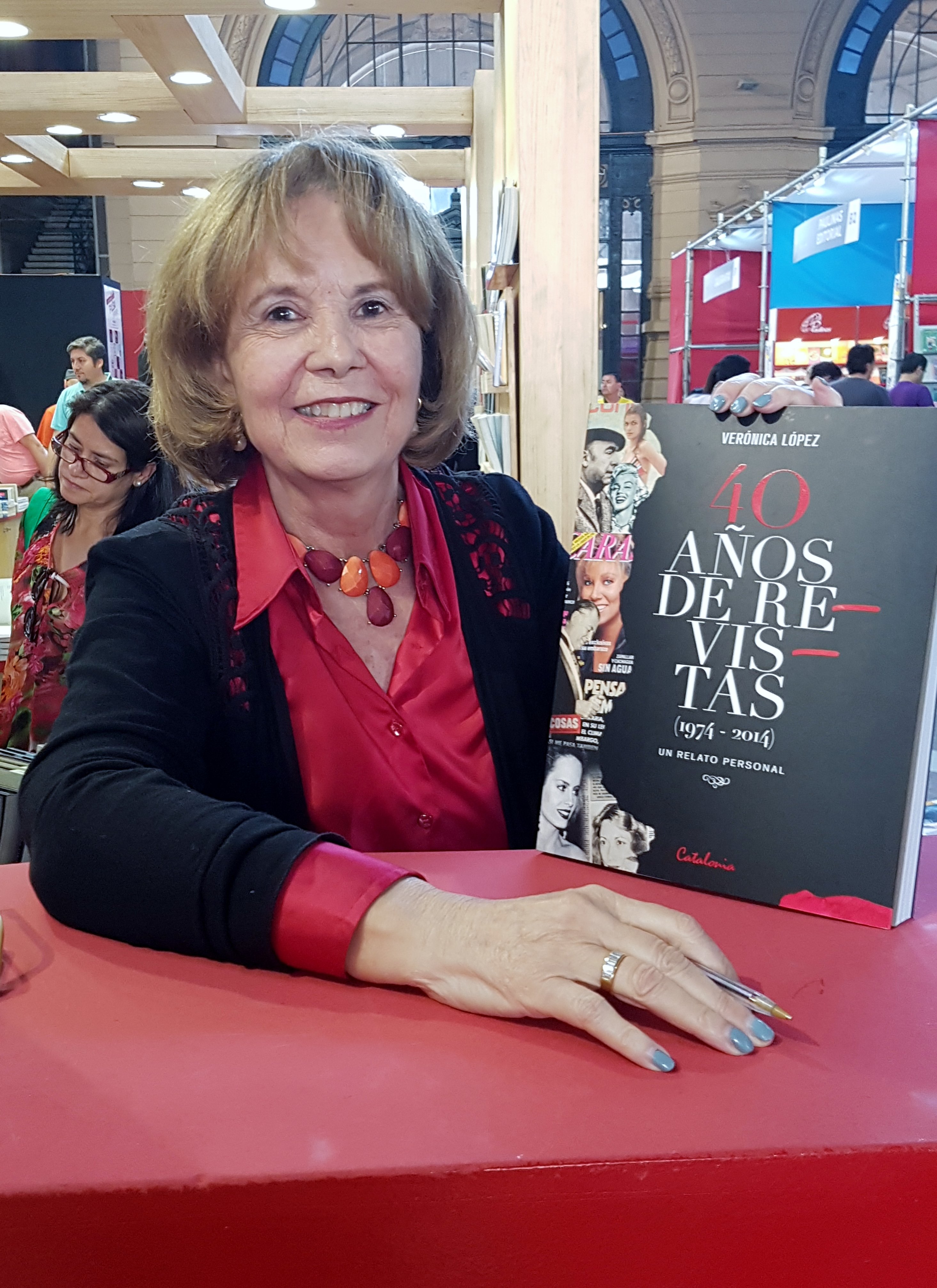 La periodista chilena Verónica López en la Feria Internacional del Libro de Santiago 2017.